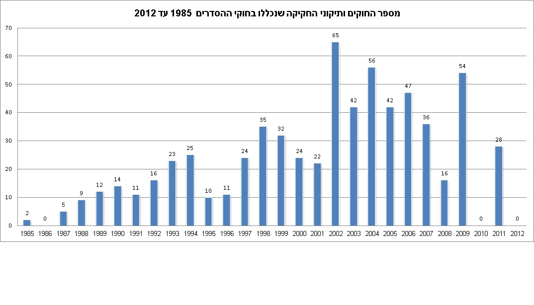 מספר החוקים ותיקוני החקיקה בחוק ההסדרים בין השנים 1985-2012